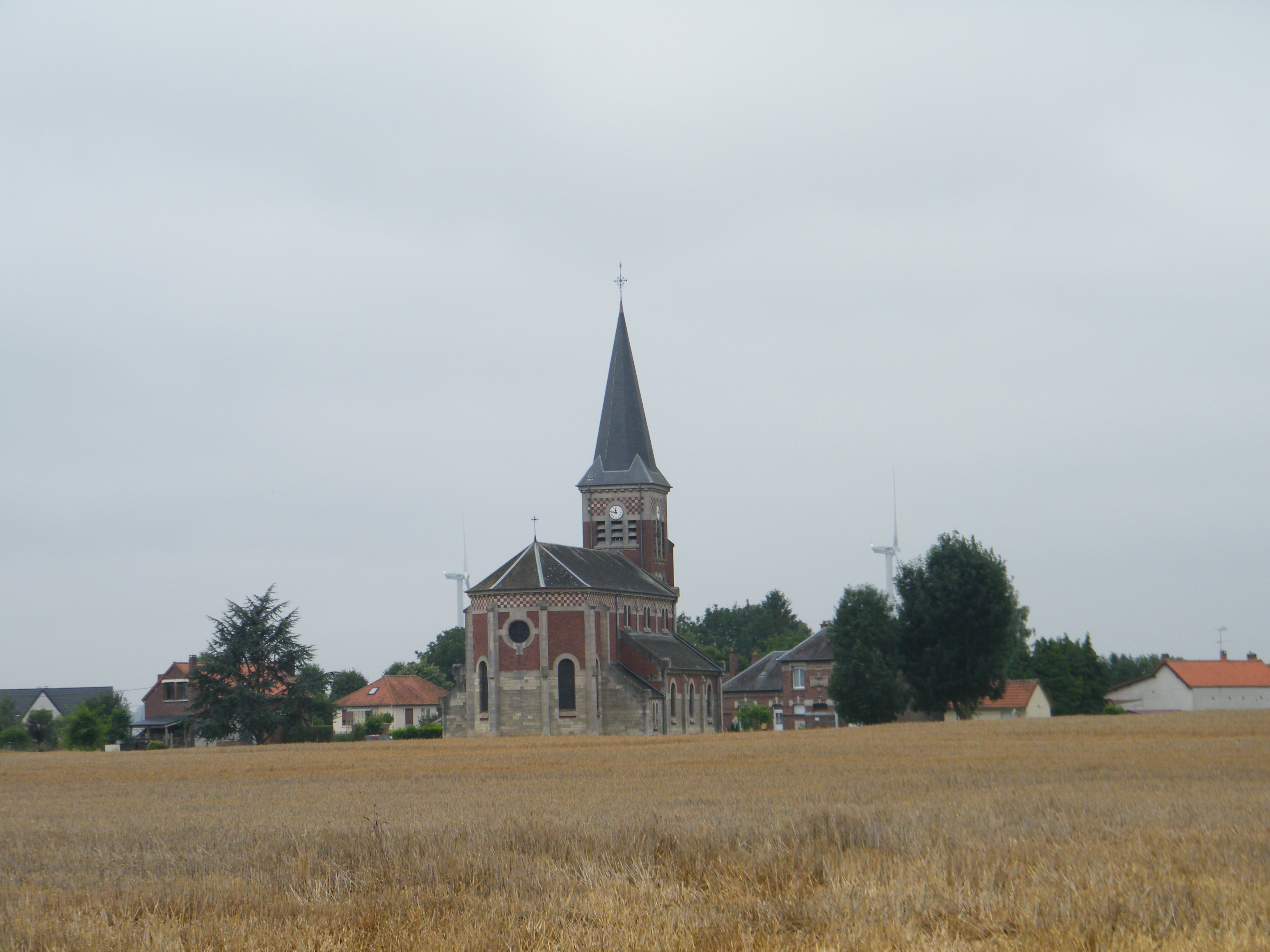 Église Saint-Agnan ou Saint-Aignan, reconstruite après la Première Guerre mondiale.